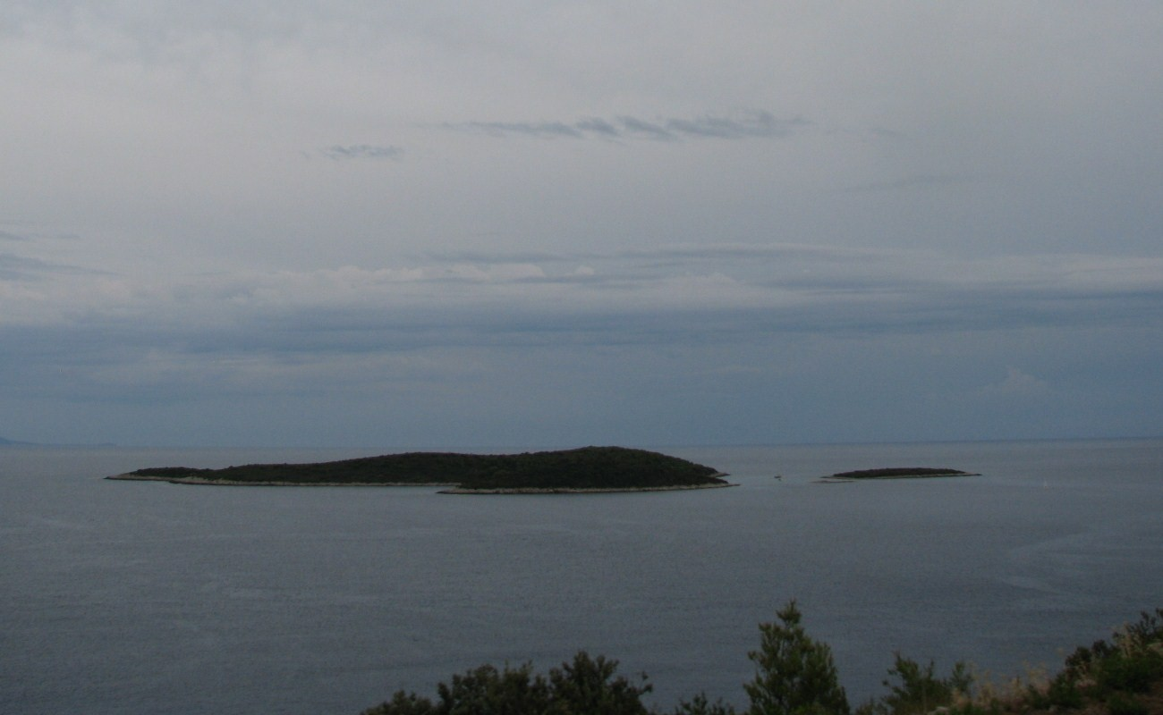 Otočići Veliki i Mali Budikovac kraj Visa